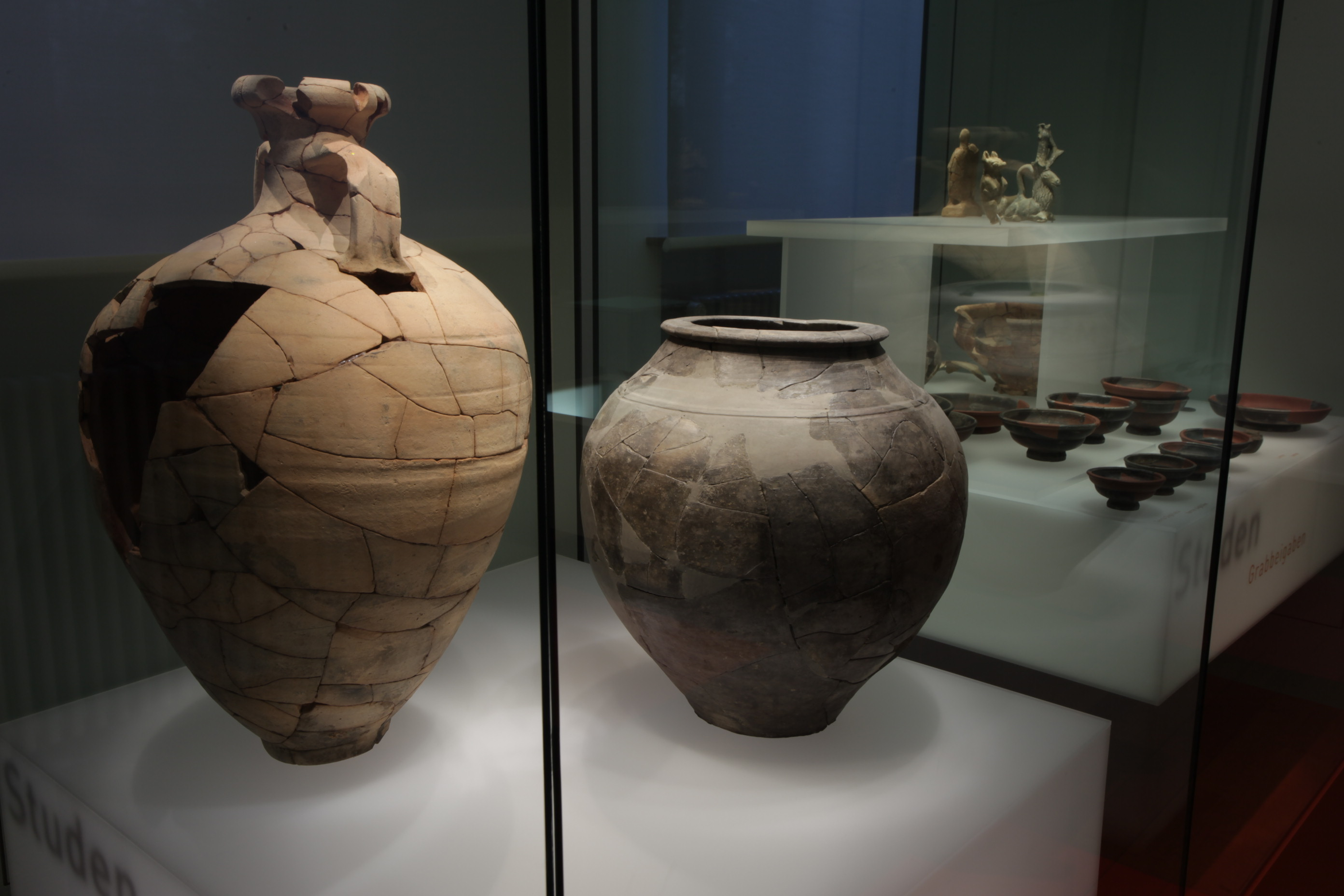 Photographie d'une vitrine de l'exposition "La fenêtre archéologique de la région", présentée au NMB Nouveau Musée Bienne. Photo: Patrick Weyeneth